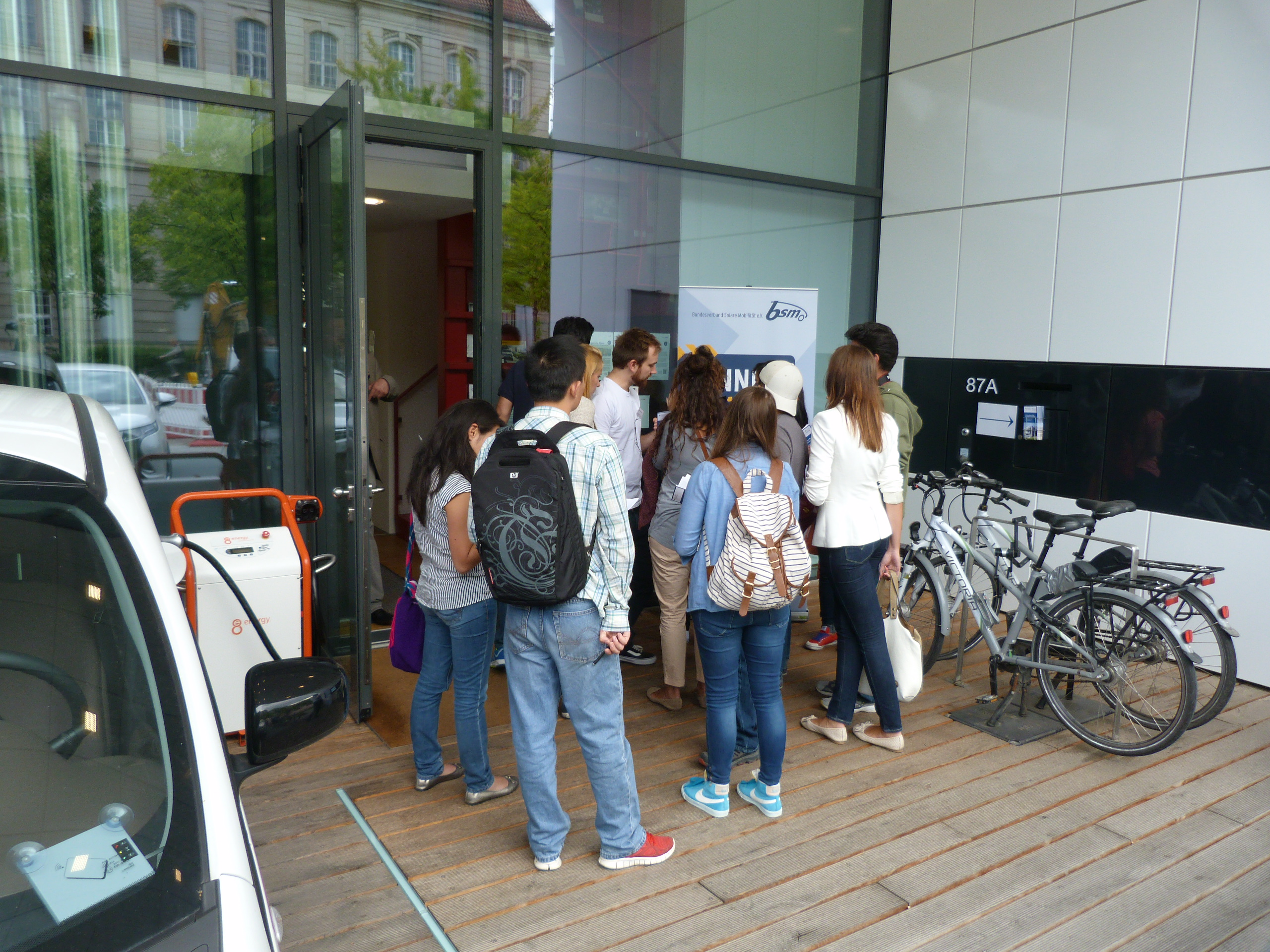 Gruppenführungen von der ZEBAU GmbH durch das Effizienzhaus Plus mit Elektromobilität